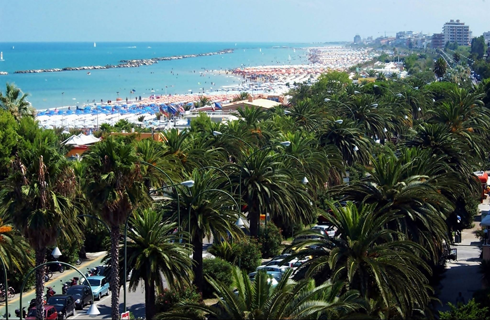 Veduta panoramica della spiaggia di San benedetto del Tronto, dominata da innumerevoli palmizi.